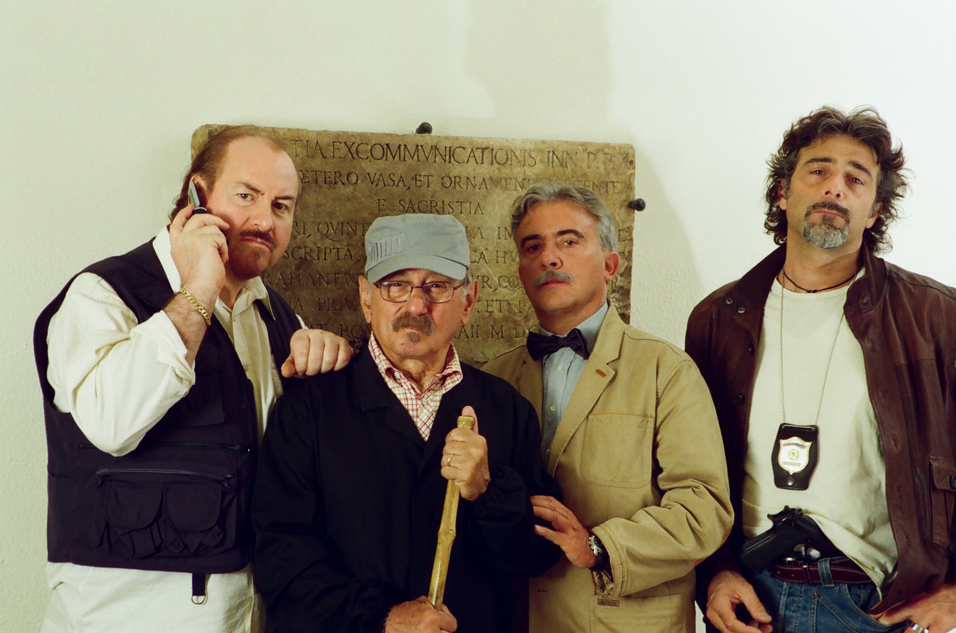 Eugenio ne "L'enigma della lapide"